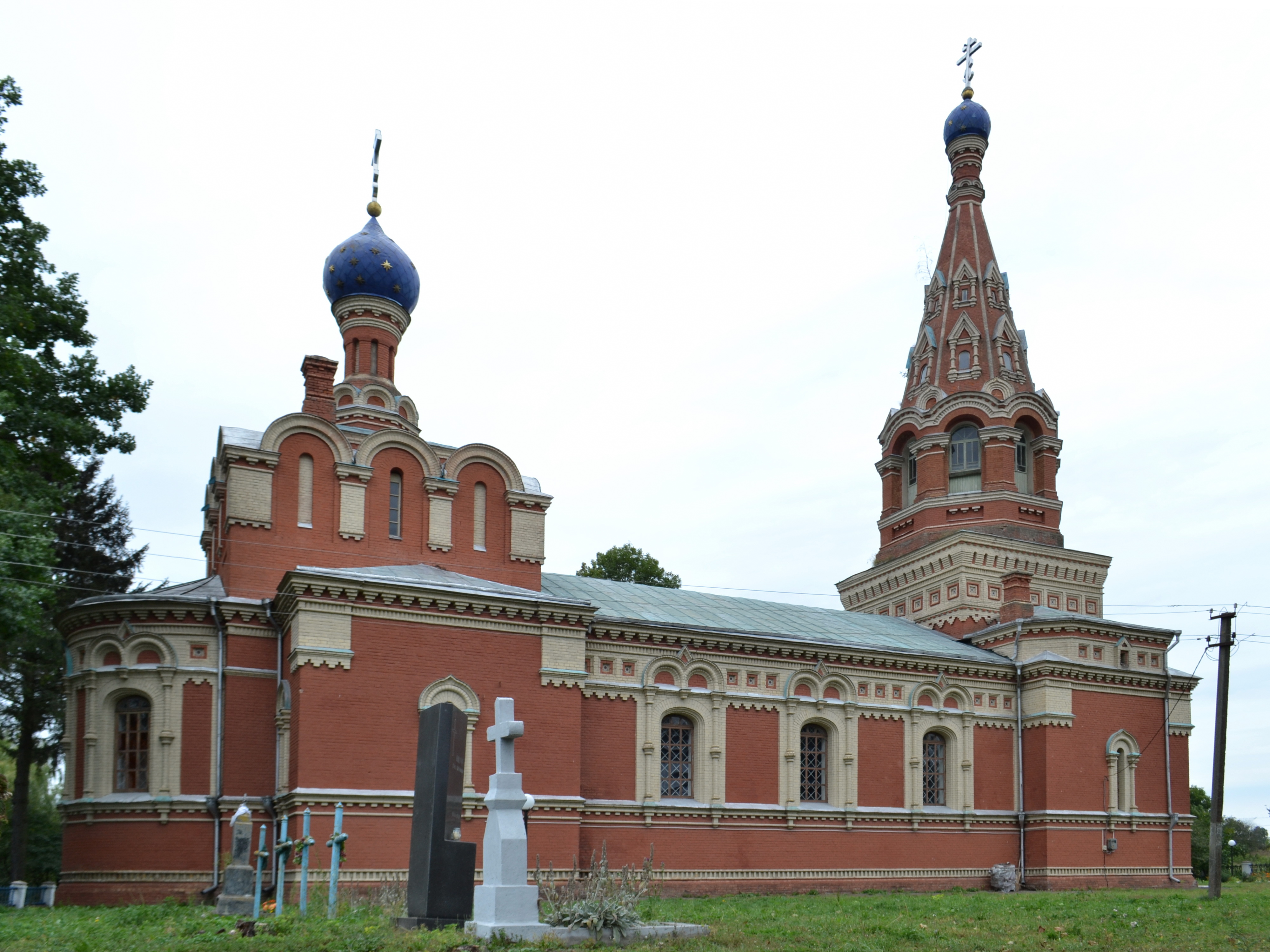 Дмитрівська церква (мур.) (1905 рік) - вигляд зі сходу - Журавники Горохівський район Волинська область Україна